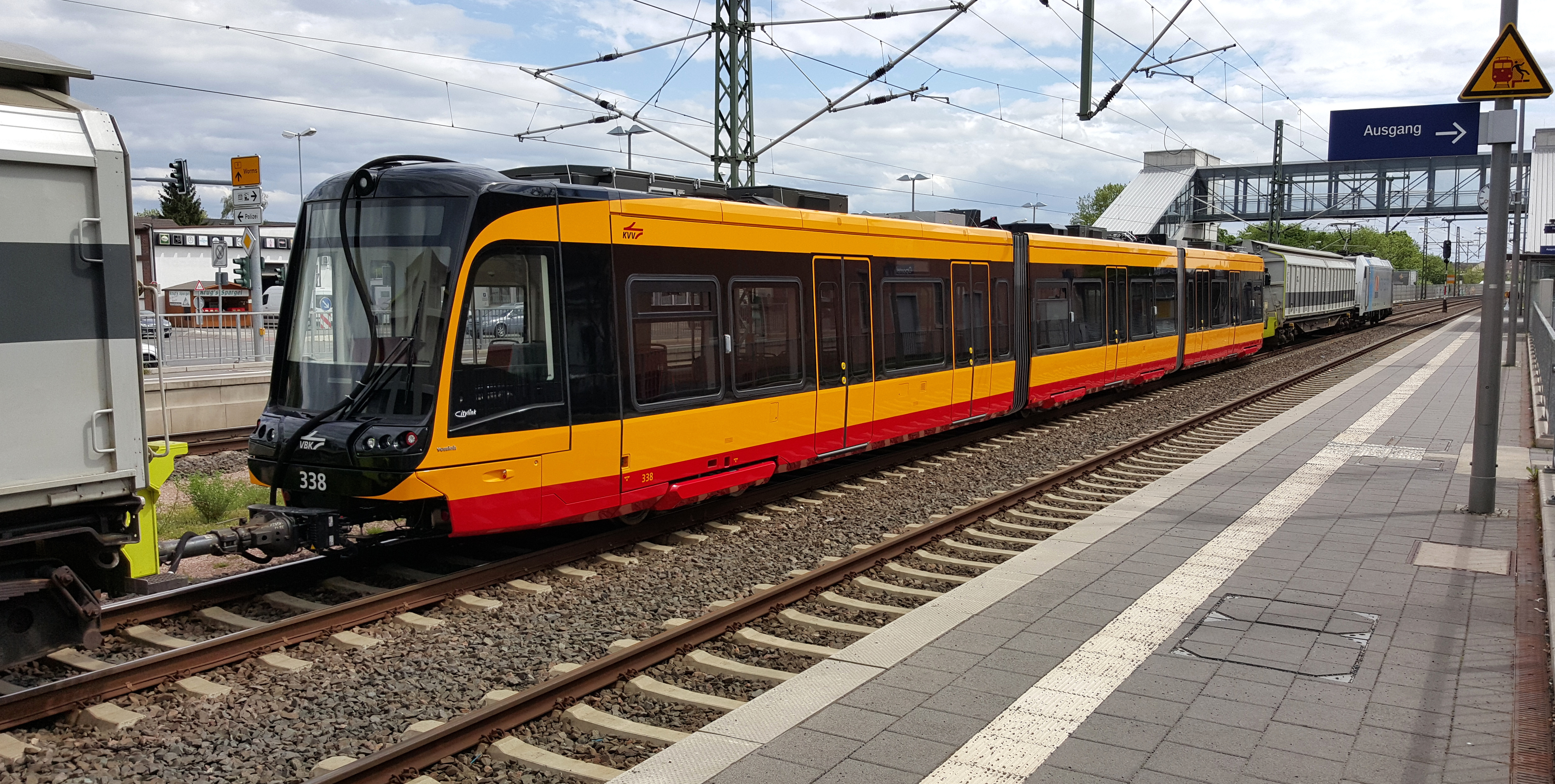 Noch nicht zugelassener Niederflur Elektrotriebwagen 2012 (Nr. 338) von Vossloh Kiepe im Bahnhof Oppenheim als Überführungsfahrt auf dem Weg vom Bahnhof Koblenz-Lützel nach Karlsruhe